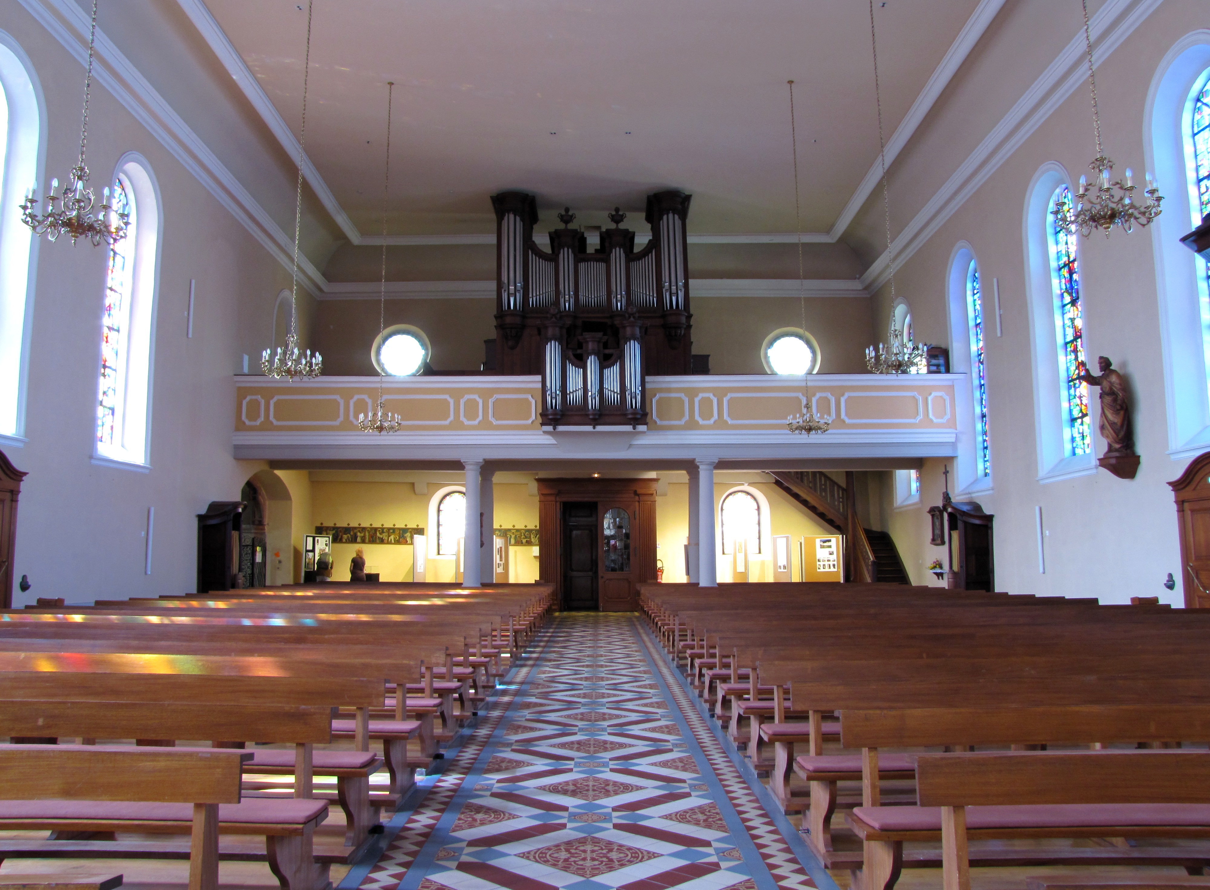 Alsace, Haut-Rhin, Église Saints-Pierre-et-Paul (XIIIe-XIXe) d'Eguisheim (PA00085415, IA68000505): Vue intérieure de la nef vers la tribune d'orgue.